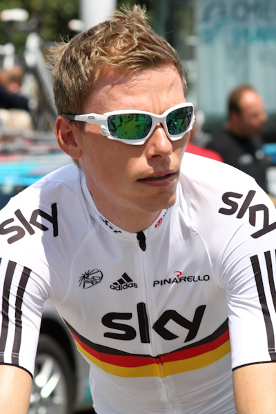 Etape 1 (Albertville) du Critérium du Dauphiné 2011